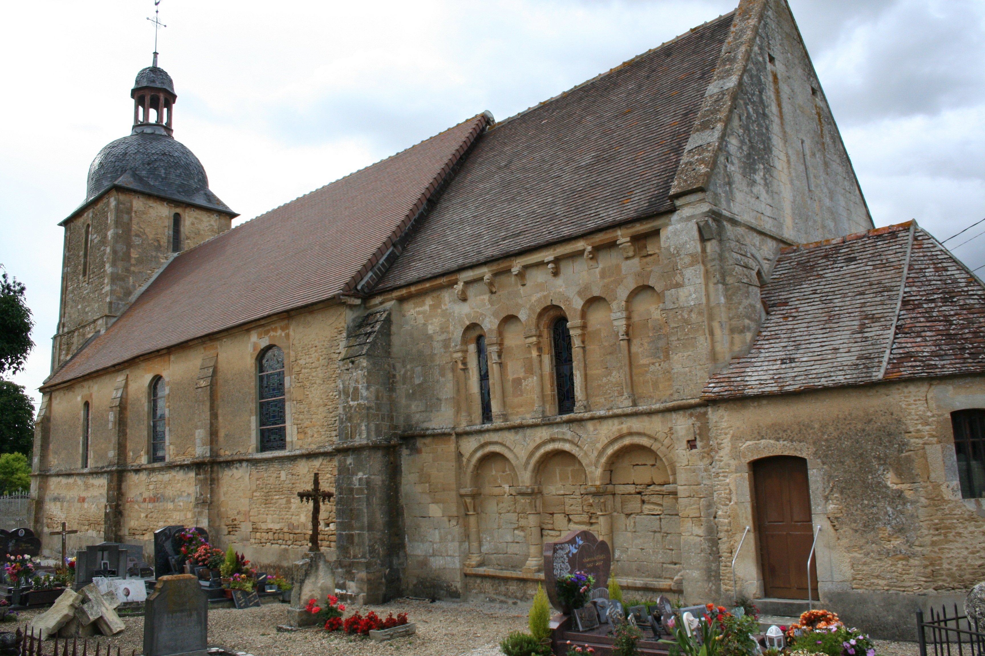 Vue générale de l'église de Courcy, Calvados, XIIe-XVIIIe s.